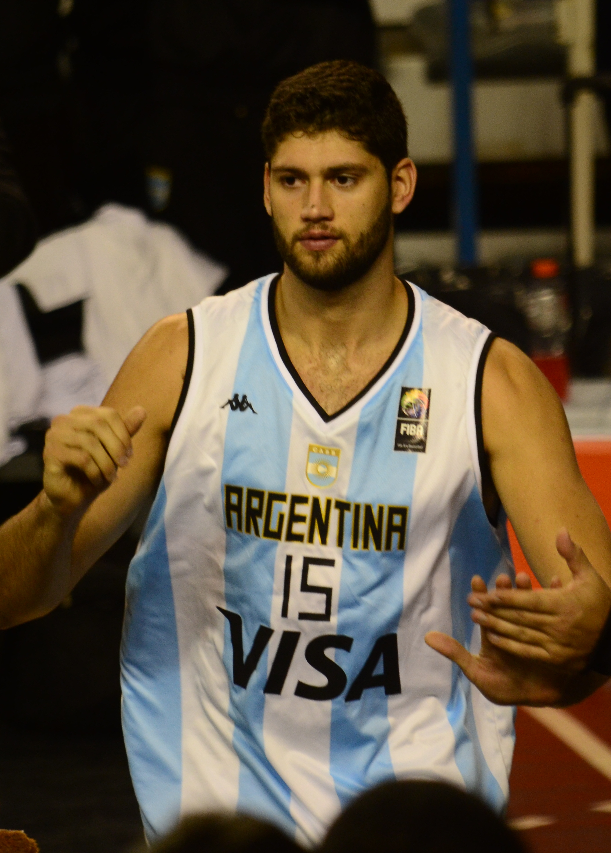 Patricio Garino